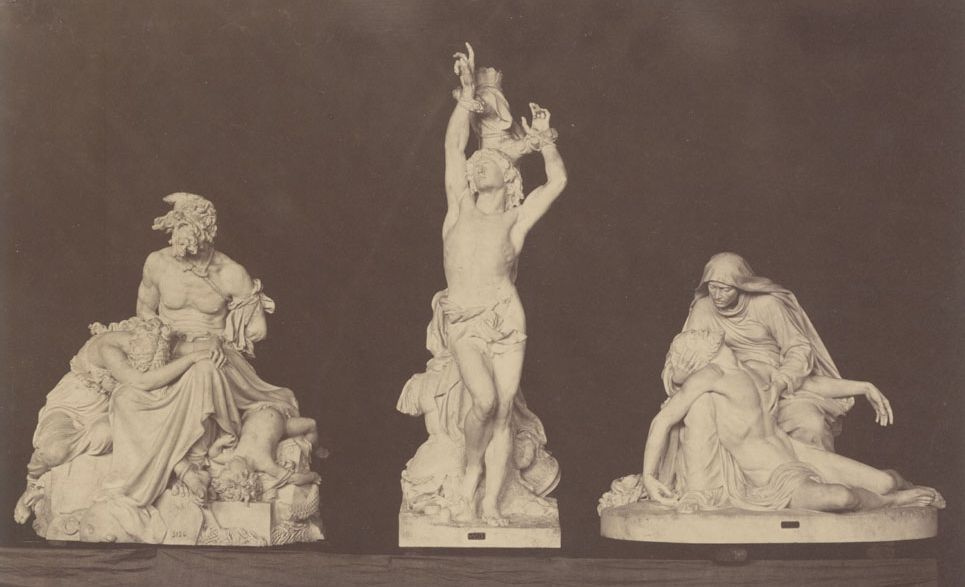 Left to right: Émile Chatrousse: Les crimes de la guerre, groupe, marble Jean Gautherin: Saint Sébastien, statue, marble Justin Chrysostôme Sanson: Pieta, groupe, marble